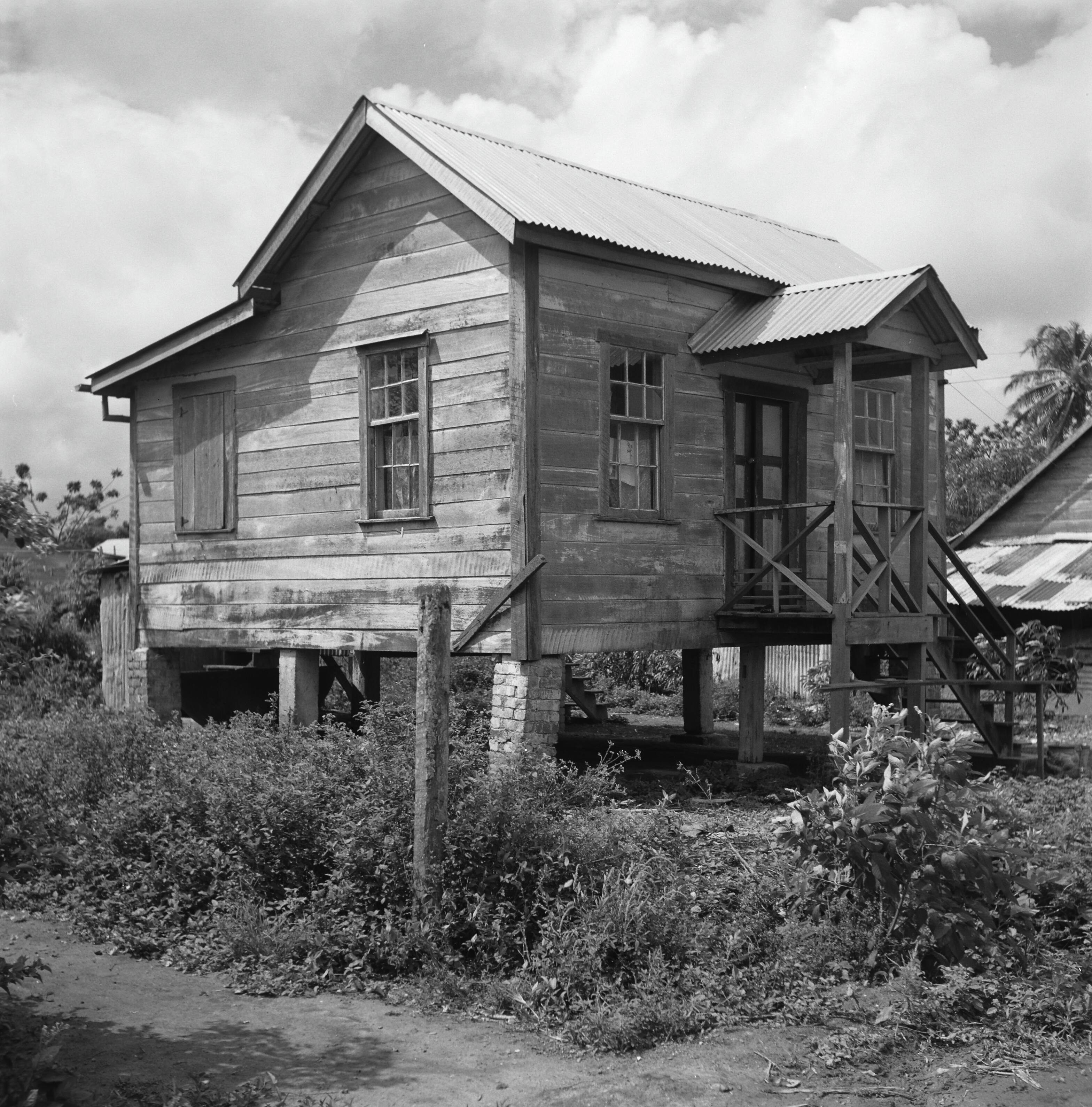 WoningOnderwerp: Huizen, woningen